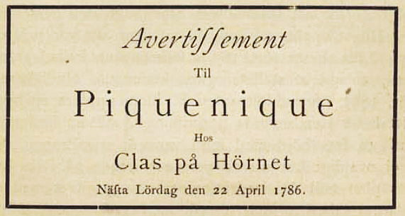 Clas på hörnet annons "Avertissement..."